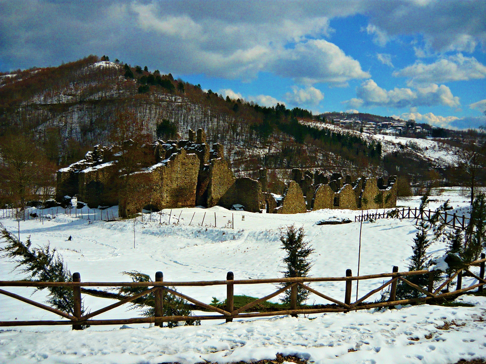 Carlopoli: l'Abbazia di Corazzo in inverno